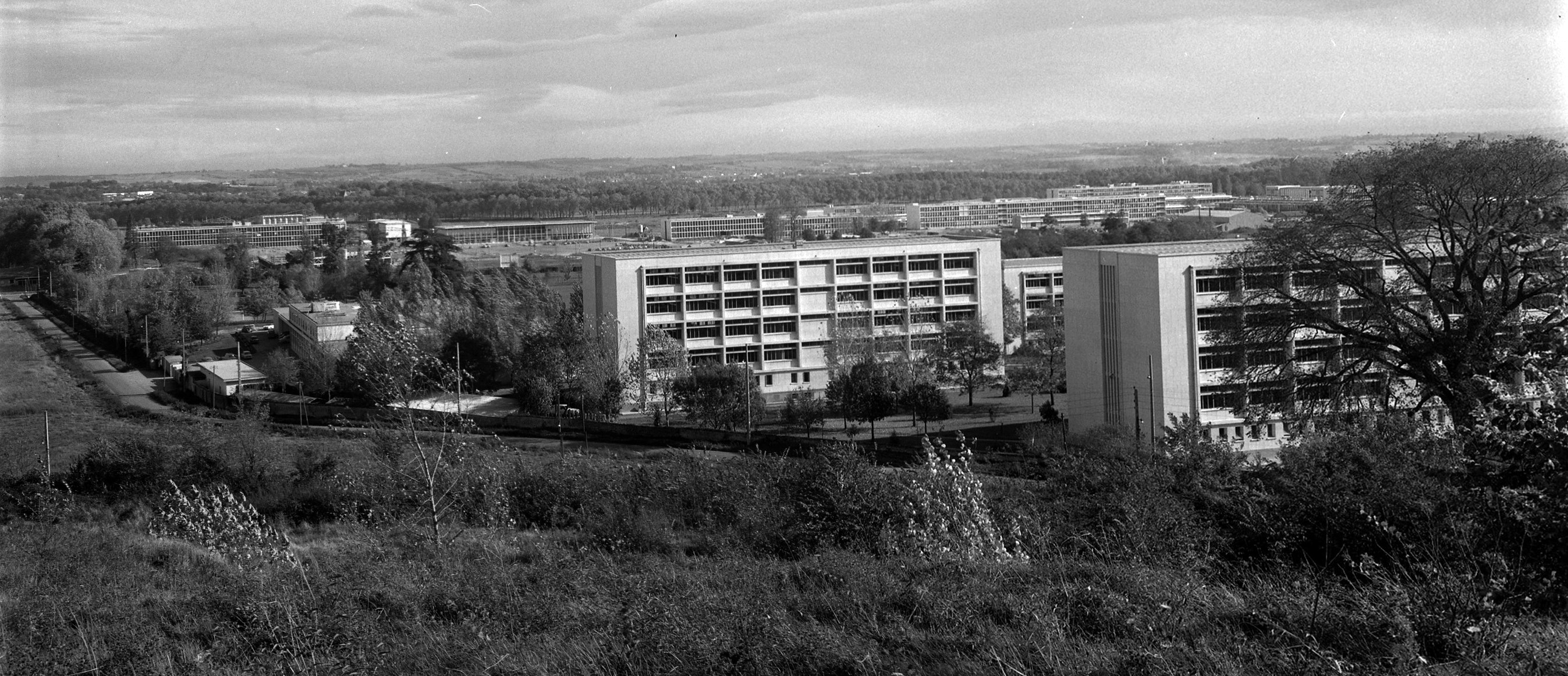 Quartier de Rangueil. Le 5 Novembre 1963. Vue du complexe scientifique de Rangueil.